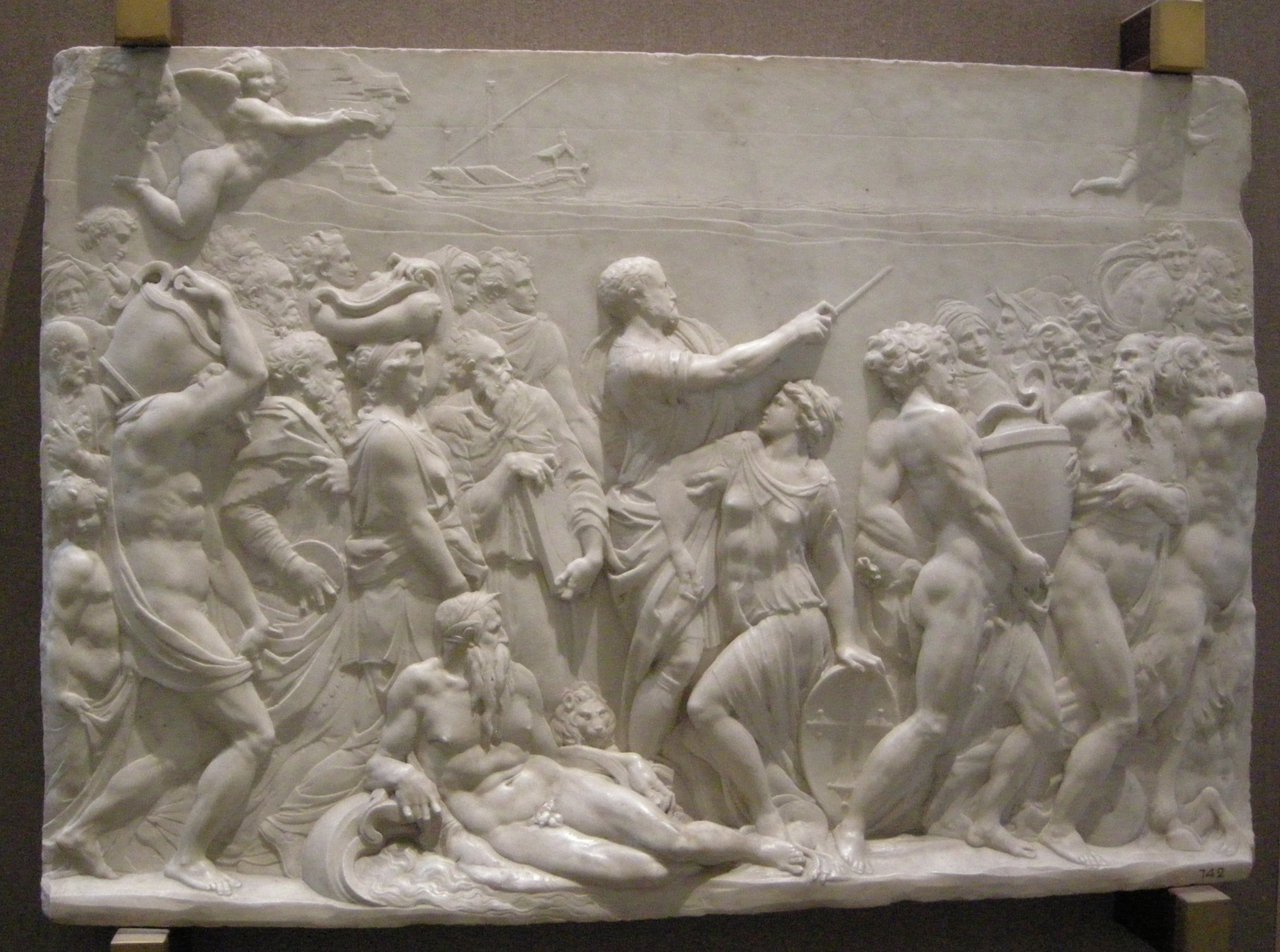 Pierino da vinci, cosimo i patrono di pisa